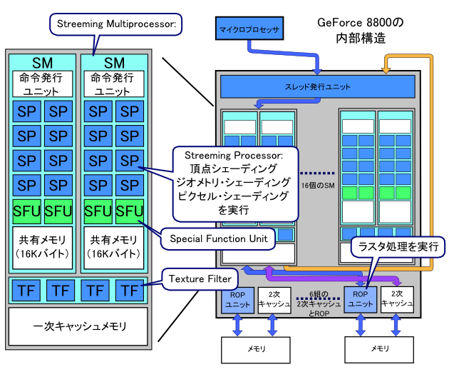 GeForce 8800の内部構造 統合シェーダである「Streaming Processor」が128個搭載されている。これにより最大500GFLOPS超で処理する。.